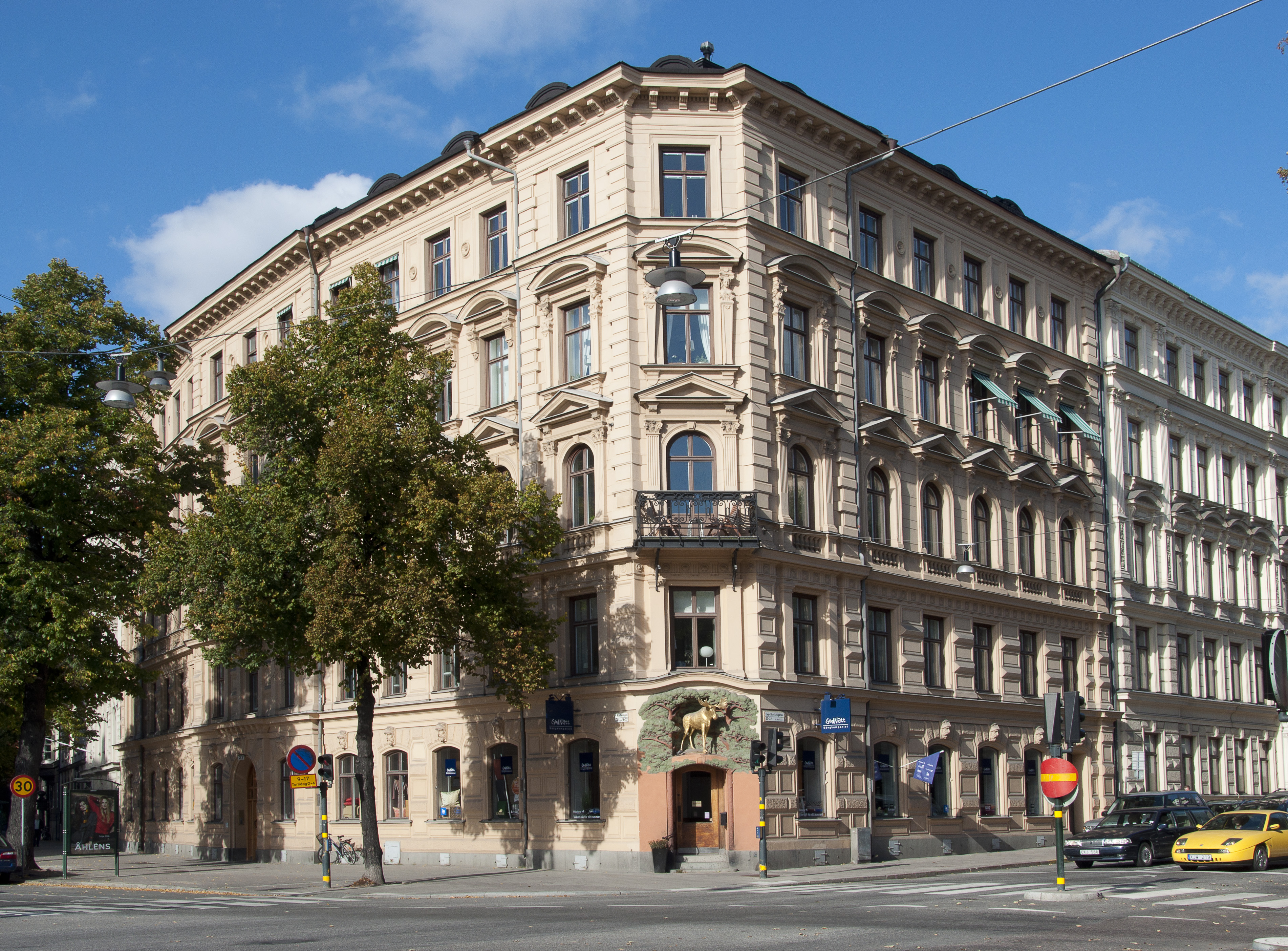 "Apoteket Älgen, Karlavägen 27, Engelbrektsgatan 27, Byggnadsår 1882, arkitekt A G Forsberg, byggherre och byggmästare J W Lagerstedt.1903 inrättades apoteket ritat av arkitekt F Priffé inkl laboratoriet i gårdsflygeln"